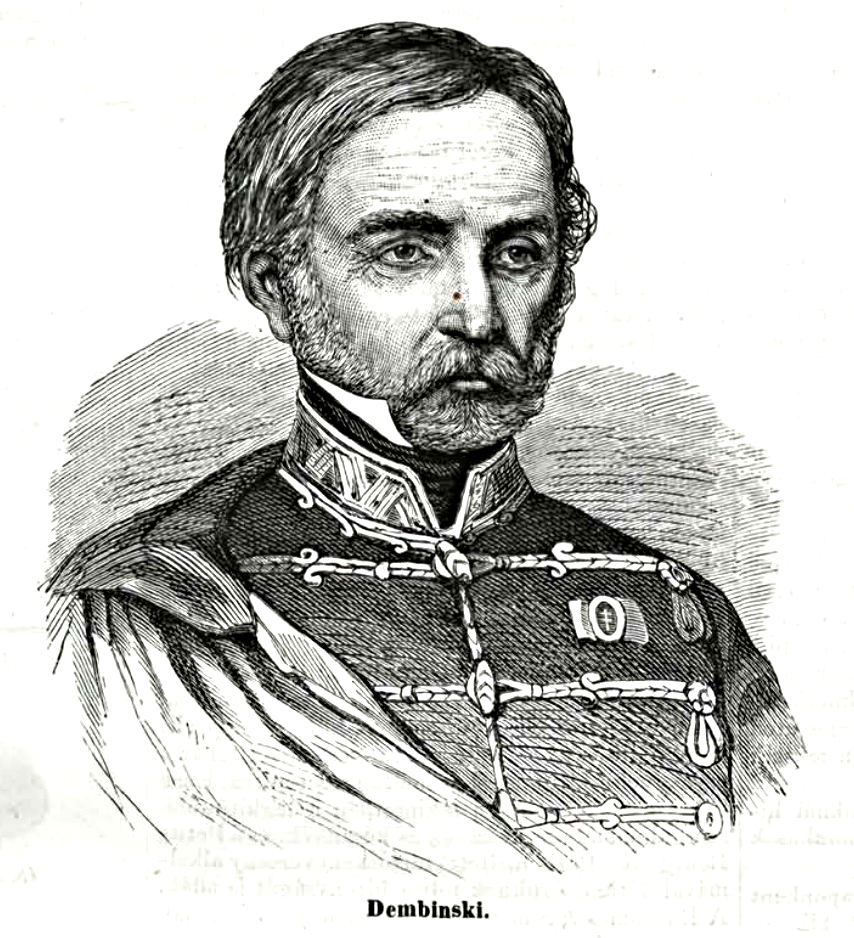 Henryk Dembiński (Vasárnapi Ujság, 1869. január 24.)